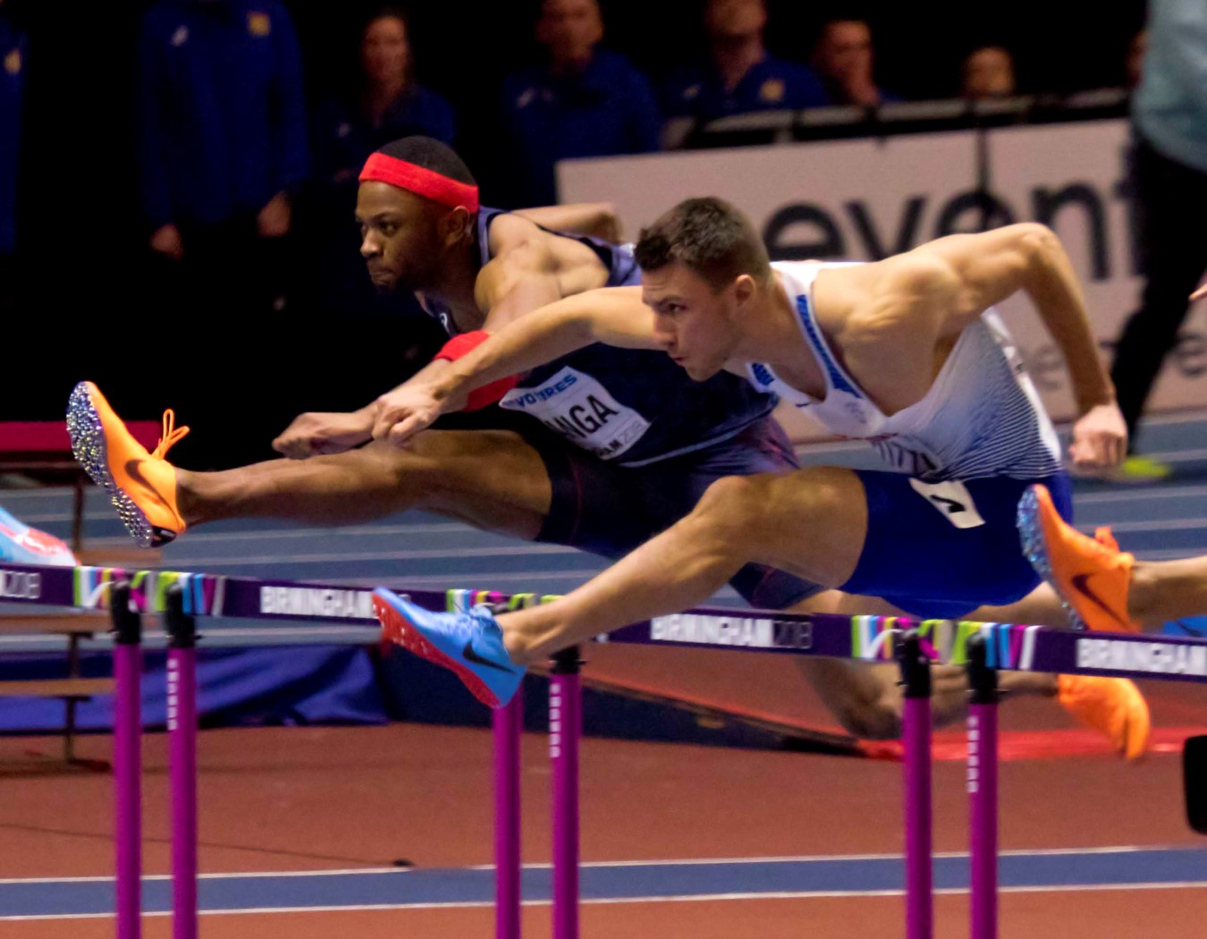 WK040218 finale 60mH pozzi manga